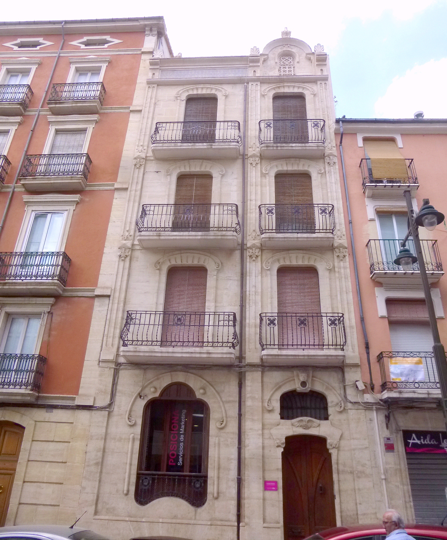 Edificio modernista en avenida País Valencià, 30 (Alcoy)